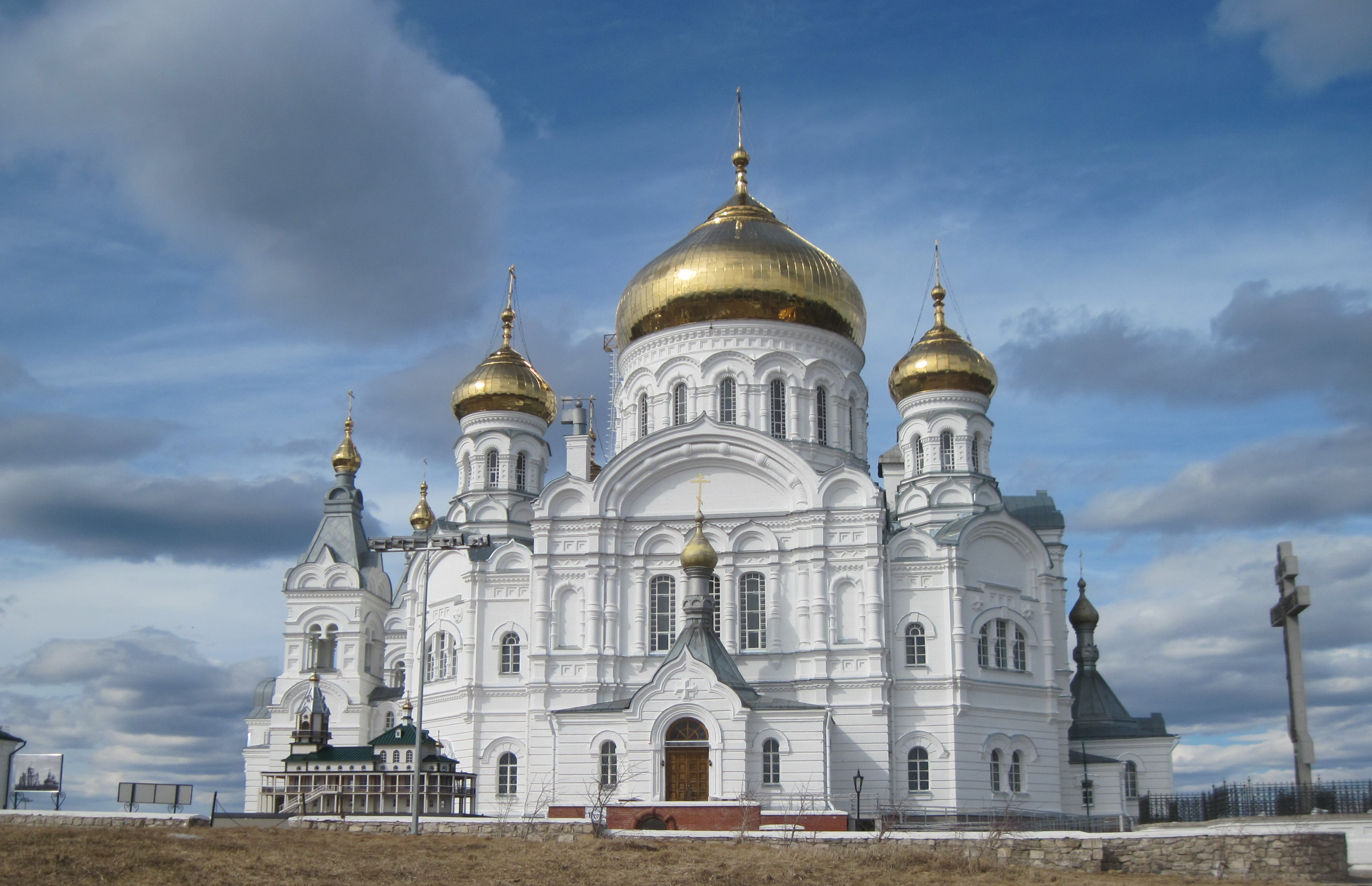 Свято-Николаевский (Белогорский) монастырь: Белая Гора, Кунгурский район, Пермский край